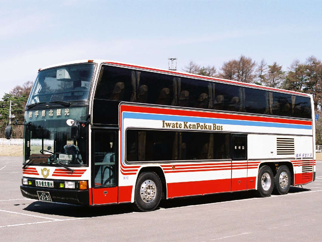 岩手県北自動車（Iwate Kenpoku bus）日野・グランビュー（P-RY638AA） 登録番号：岩22か21-91